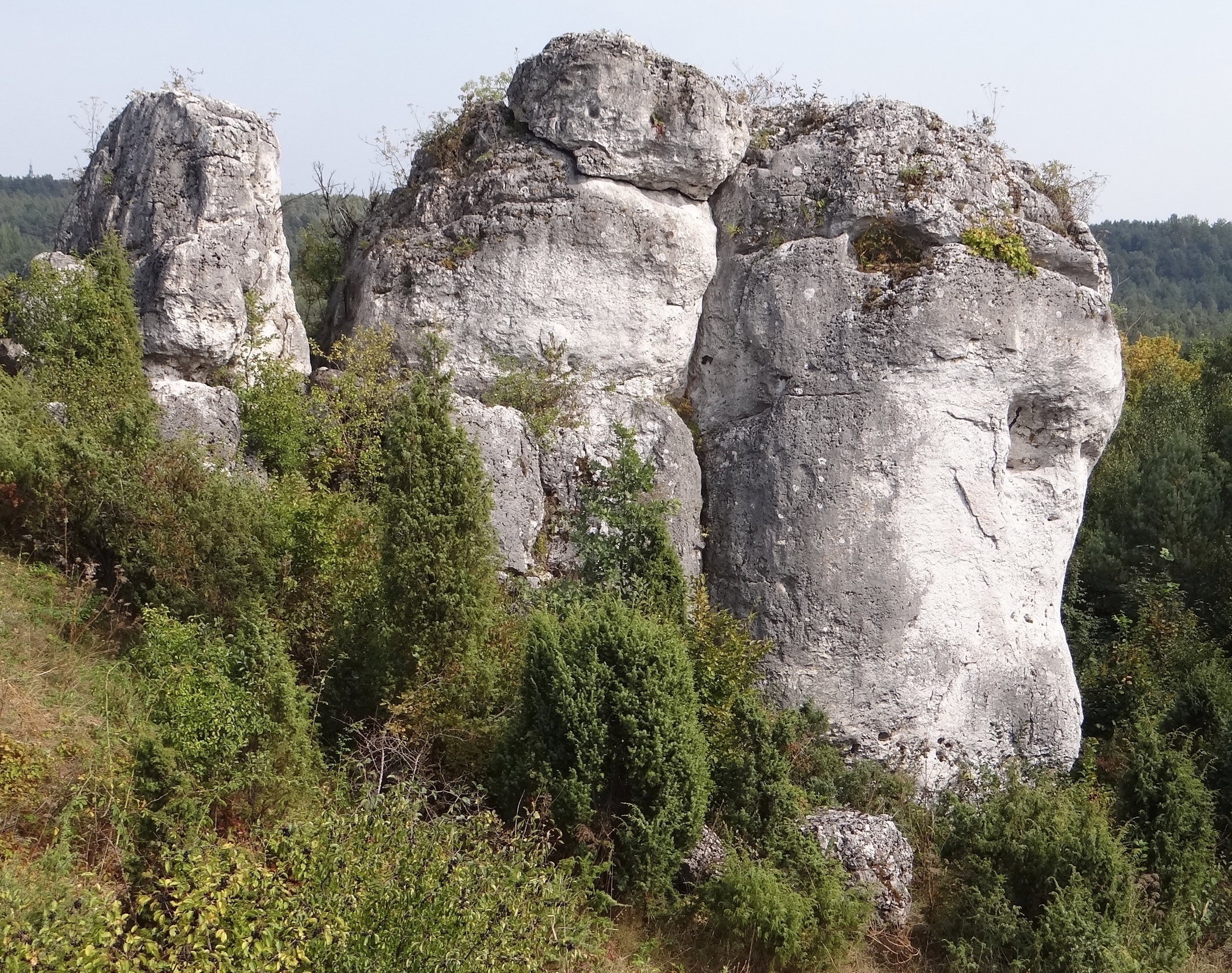 Grupa Łysej w Łutowcu